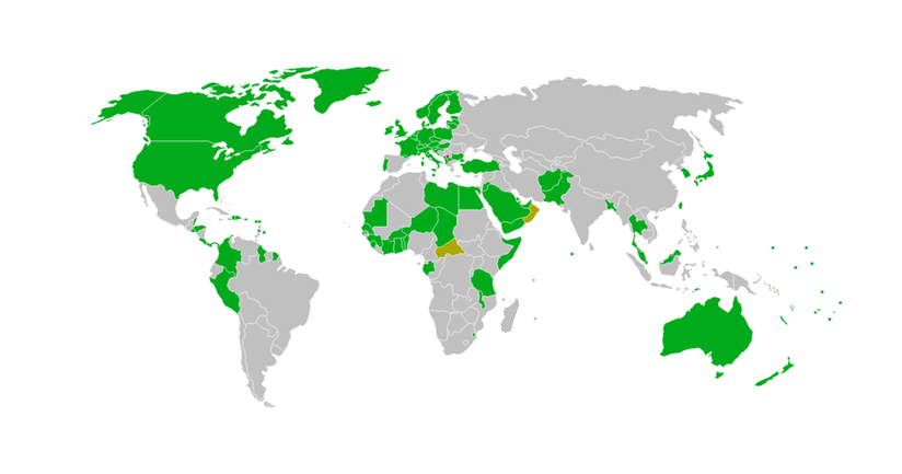 Палау повукао признање Косова